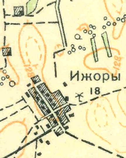 Топографическая карта Ленинградской области, квадрат О-35-24-Б-в (Вохоново), деревня Ижора